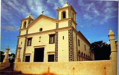 Igreja Nossa Senhora da Conceição - Restaurada